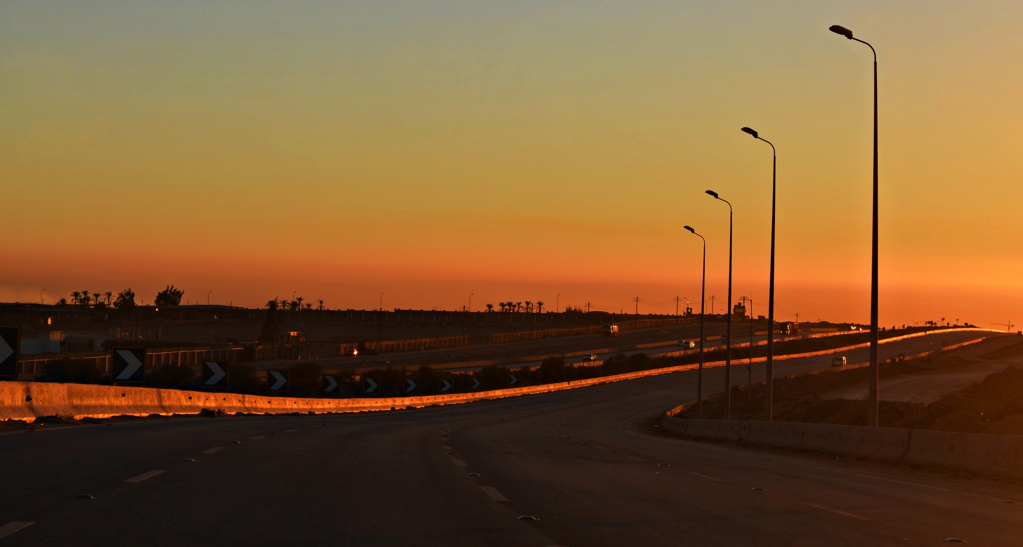 طريق القاهرة - الإسكندرية الصحراوي (إتجاه القاهرة) وقت الشروق